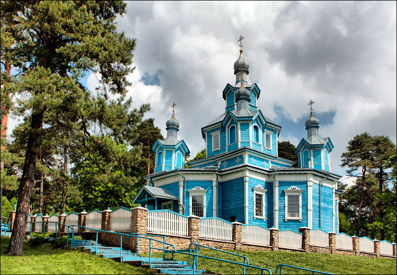 Хатляны. Пакроўская царква